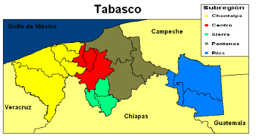 Mapa creado con Microsoft Paint